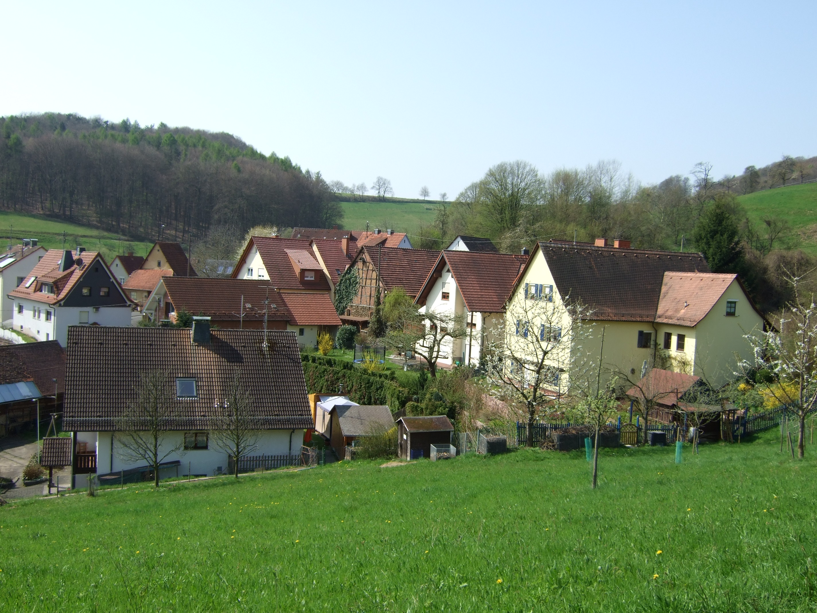 Die Häuser von Angelsberg